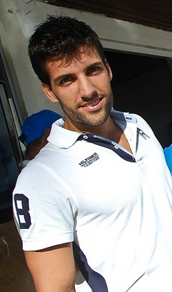 Árbitro de Futebol Diego Pombo no Carnaval de Salvador em 2012